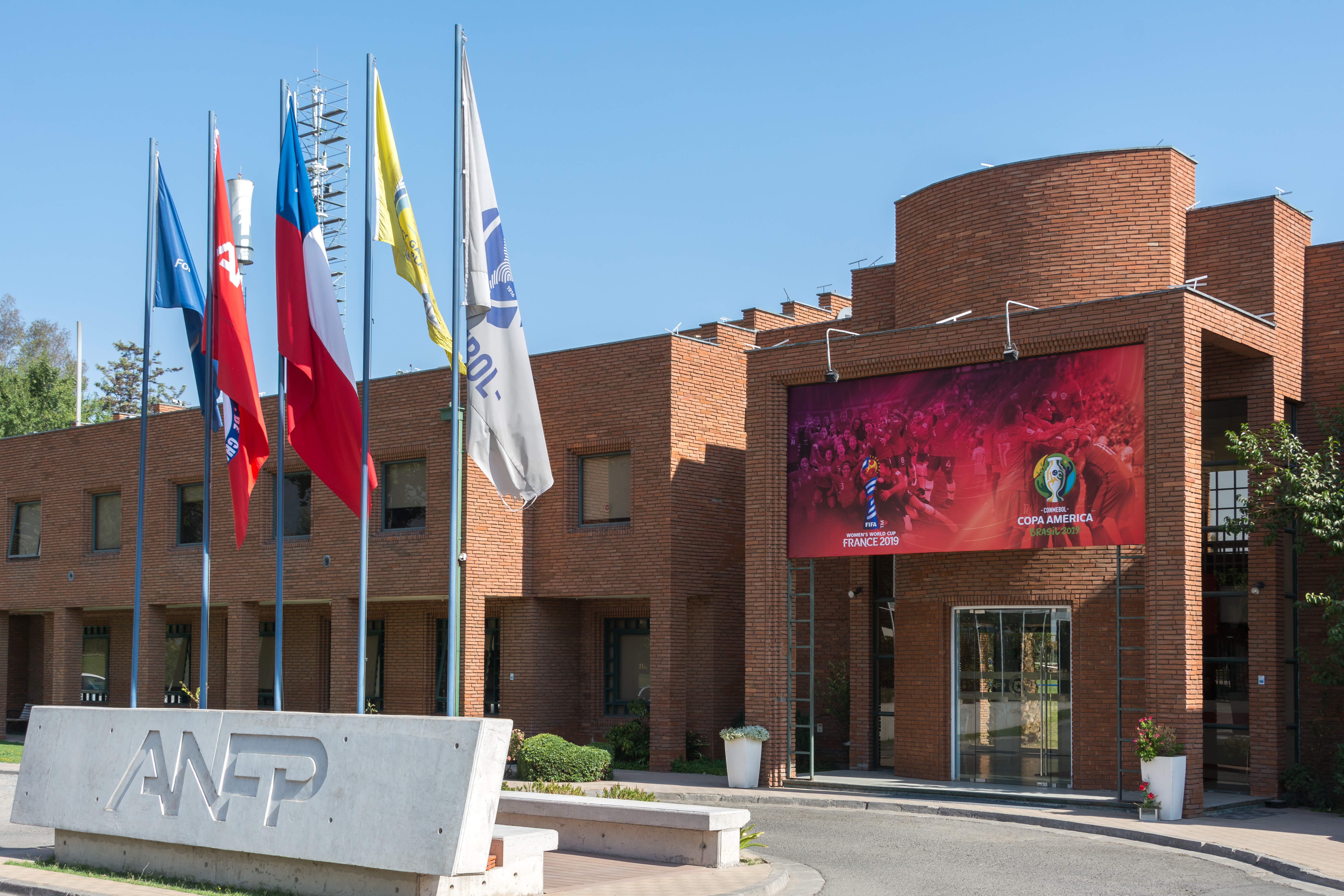 Sede de la Asociación Nacional de Fútbol Profesional, Peñalolén, Santiago, Región Metropolitana, Chile.